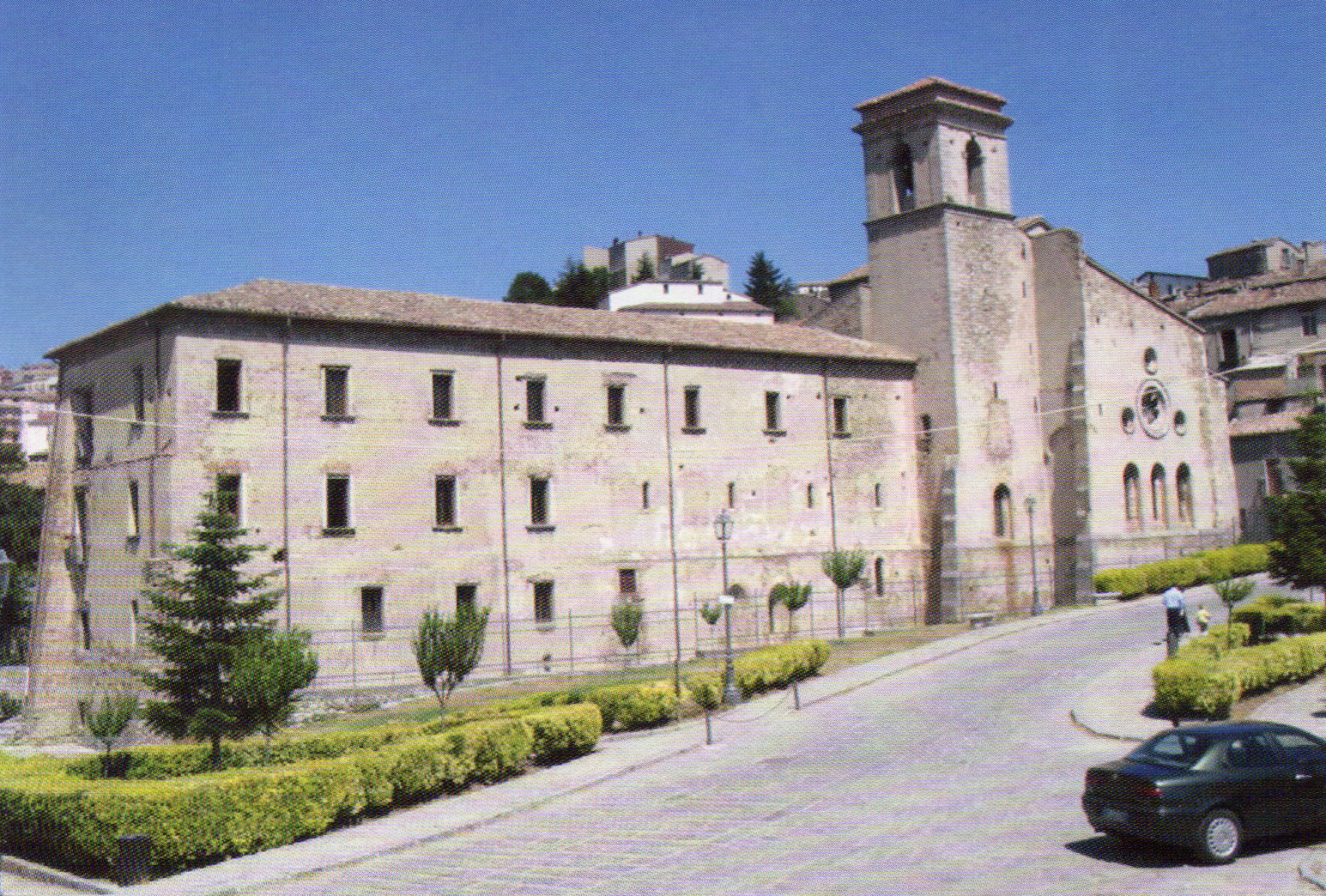 Abbazia Florense - Centro Studi Gioacchimiti e Museo Demologico